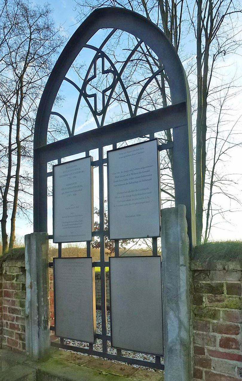 Stilisierte Tür an der Ruine der ehemaligen Grabkapelle mit den Gräbern von Maximilian Speck von Sternburg und seiner Gemahlin